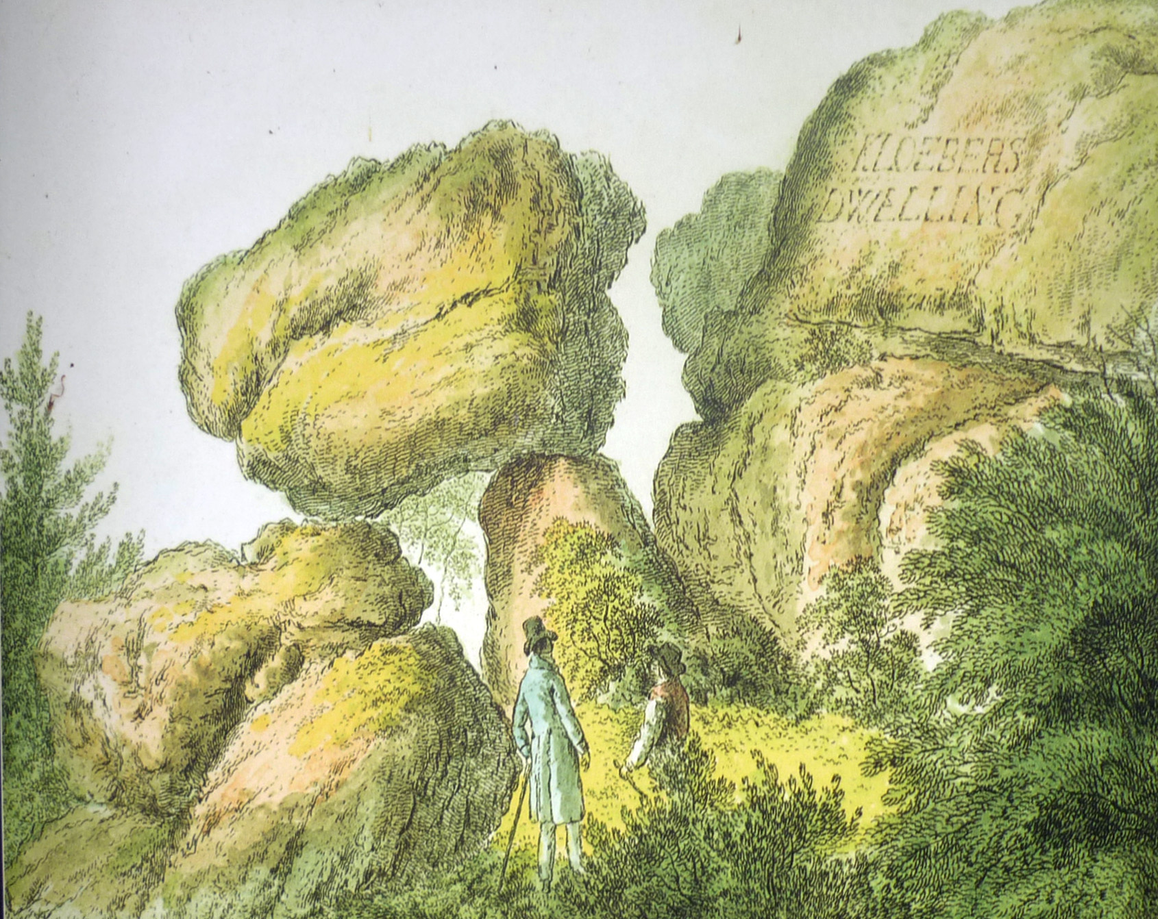 Felsgruppe "Kloebers Dwelling" zur Erinnerung an den schweizer Historiker Karl Ludwig Klöber (1739–1795) in Buchwald (Bukowiec) in Niederschlesien